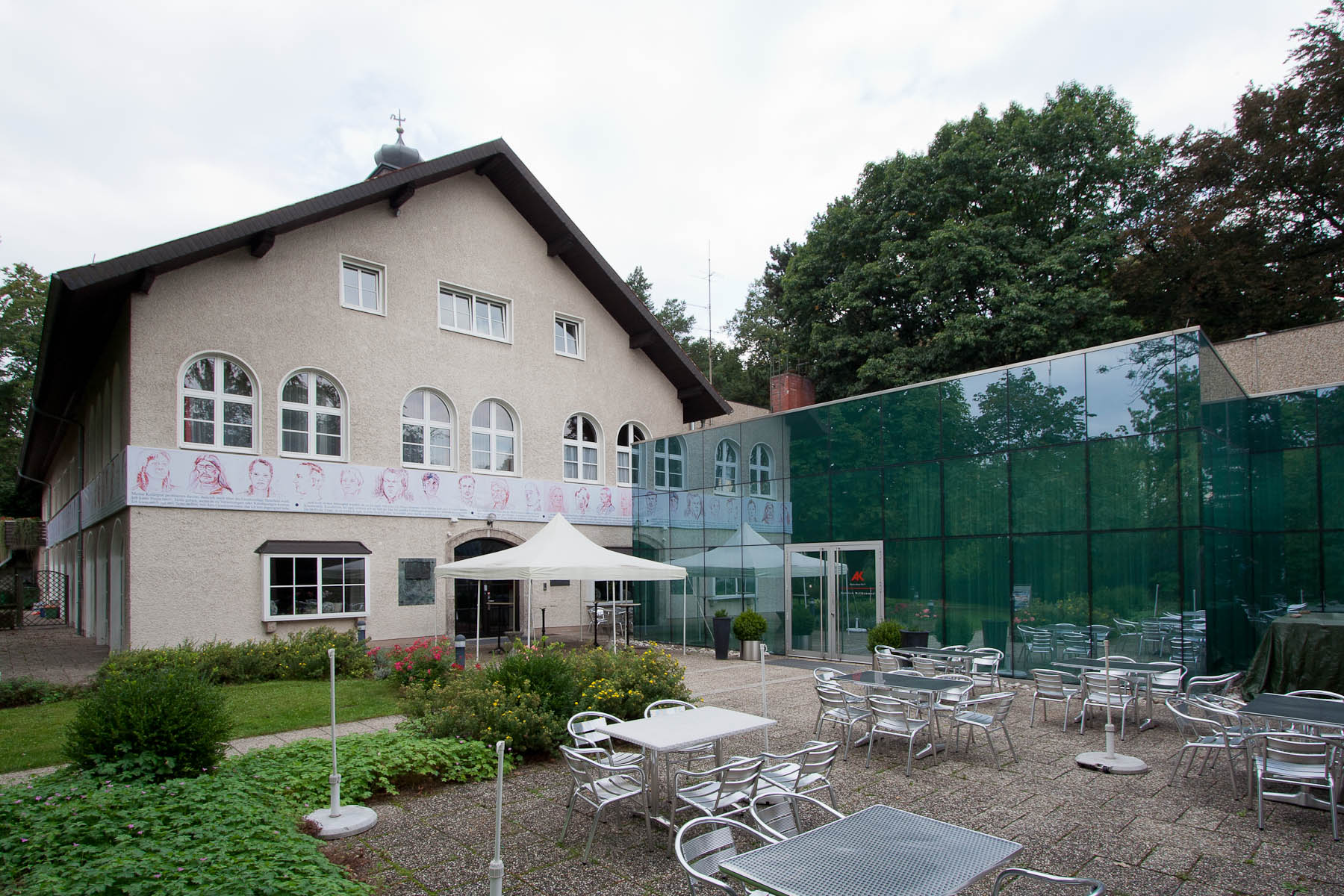 Jägermayerhof, ArbeiterkammerJägermayrhof